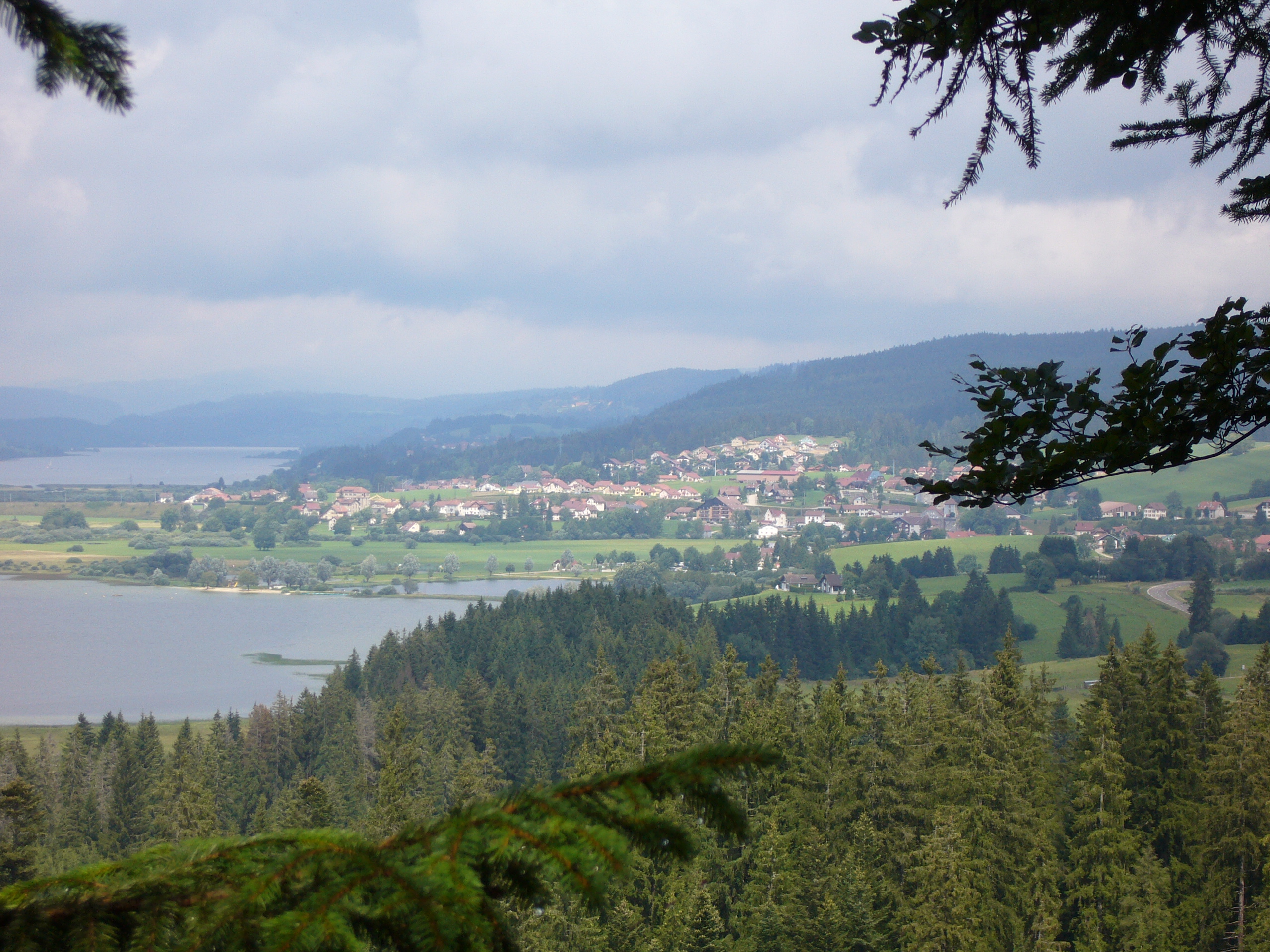 Auteur: Utilisateur:Suaudeau Description: Vue de la commune de Labergement-Sainte-Marie et de la vallée des lacs Saint-Point et Remoray.